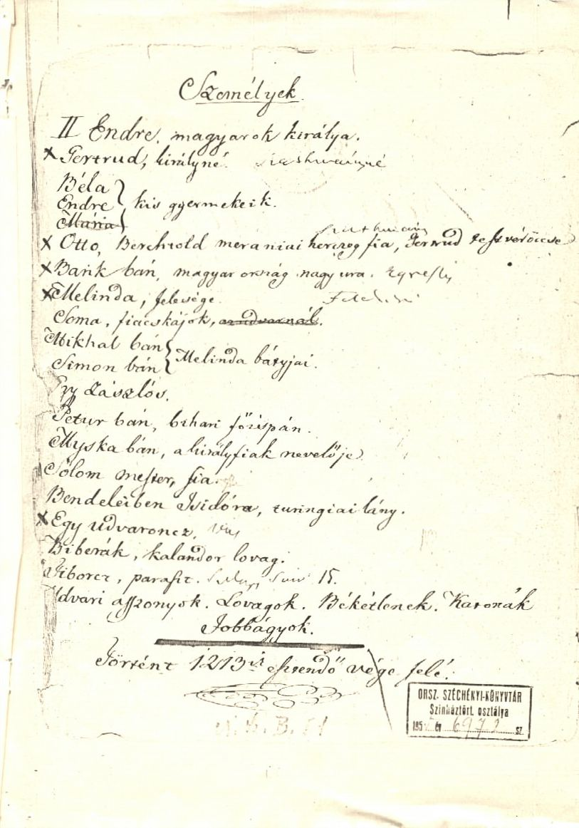 Bánk bán szereplői a szerző kéziratával